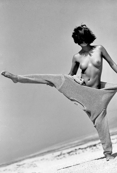 Fotografie z archivu Adolfa Ziky